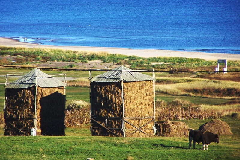 Baraques typiques servant de réserve de foin pour l'hiver, à Bassin, Îles-de-la-Madeleine.